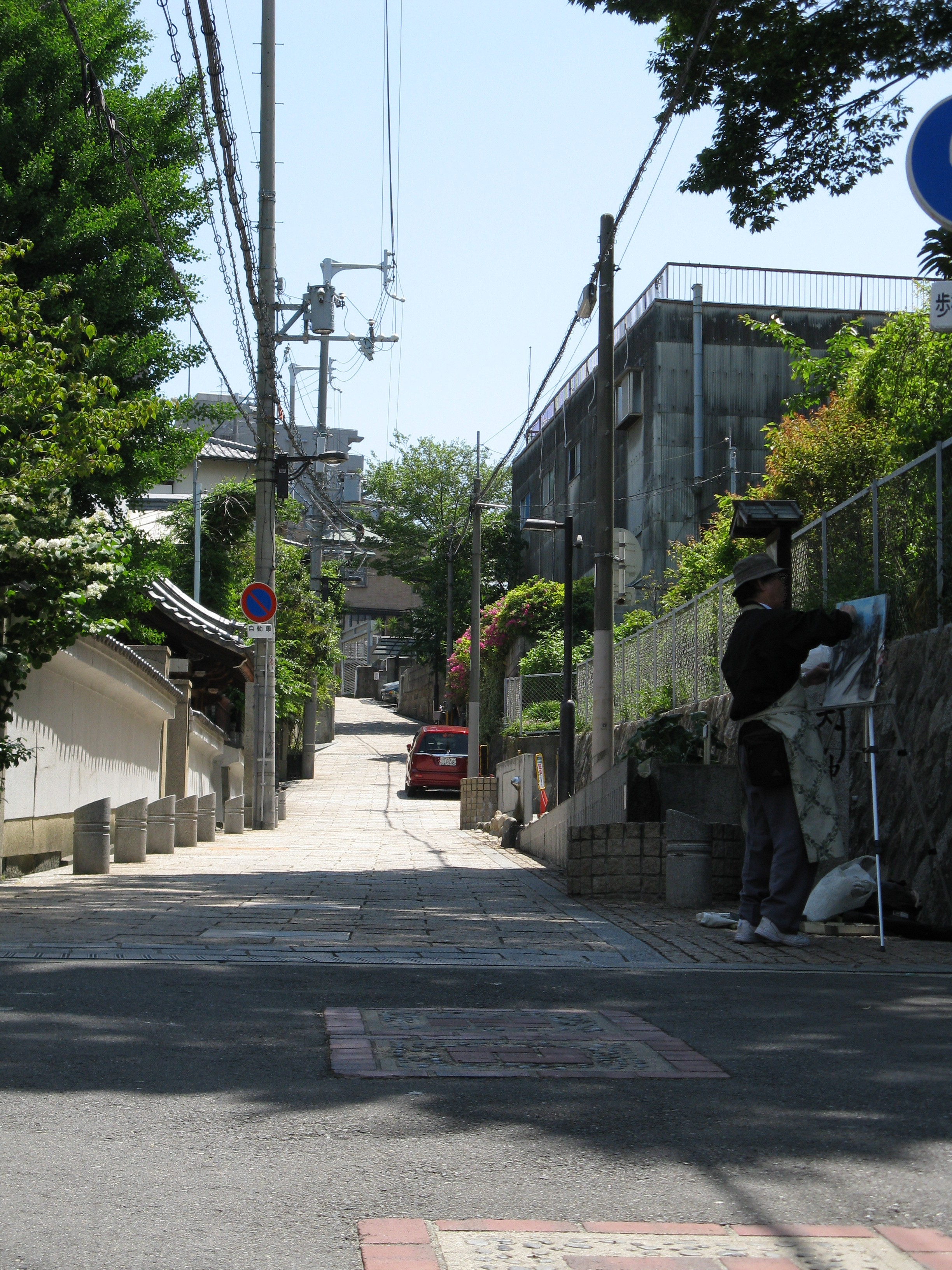 天神坂（天王寺七坂のひとつ）